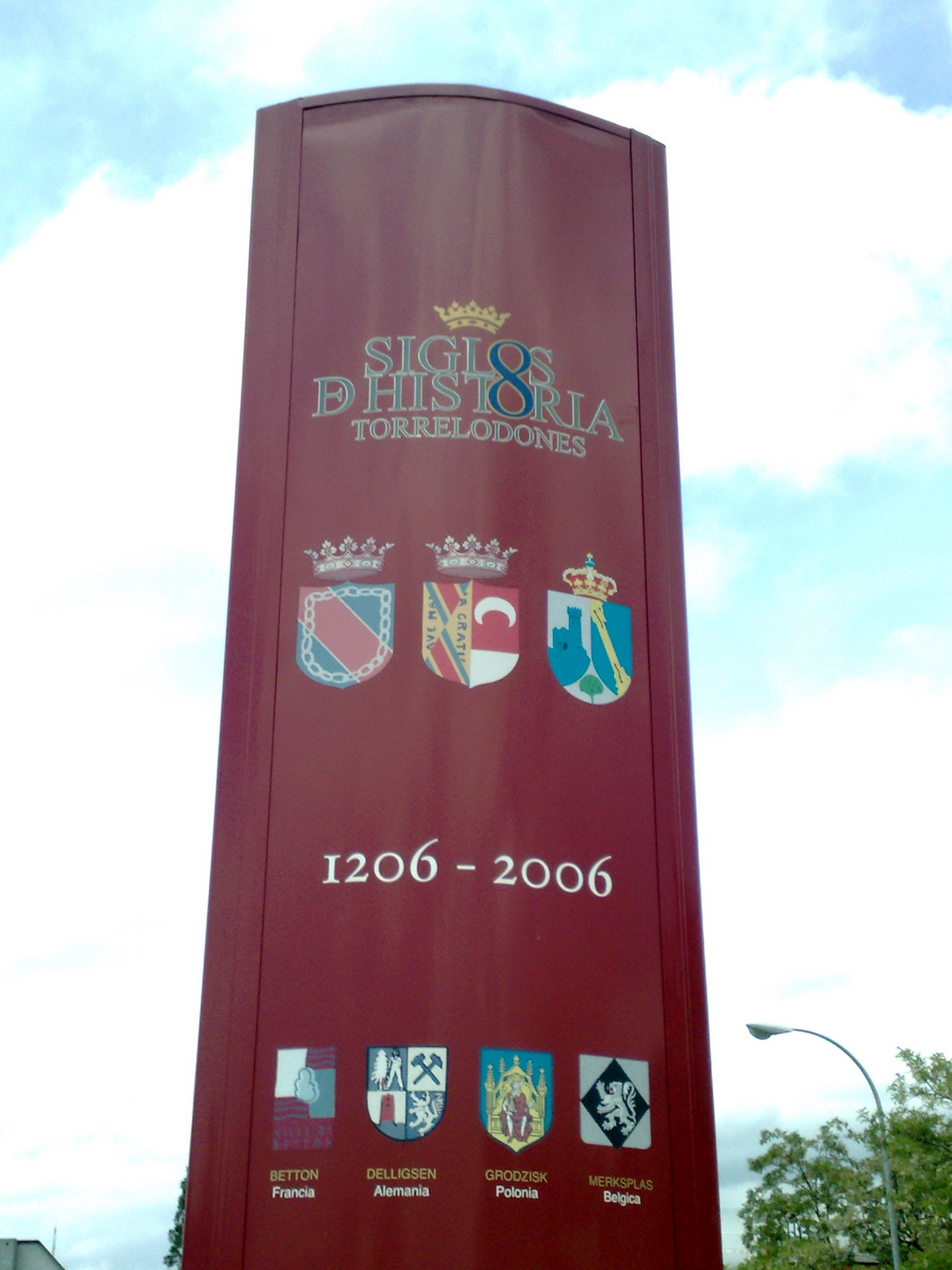 Torrelodones. Conmemoración octavo centenario situado a la entrada del pueblo en calle Camino de Valladolid.